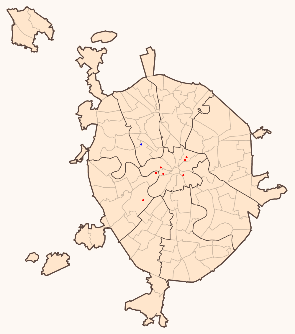 Emplacement des Sept Sœurs de Staline (en rouge) à Moscou. Le point bleu représente l'emplacement de la "huitième sœur moscovite", le Triumph-Palace. Source: Montage de Bardovskii, effectué le 4 août 2006